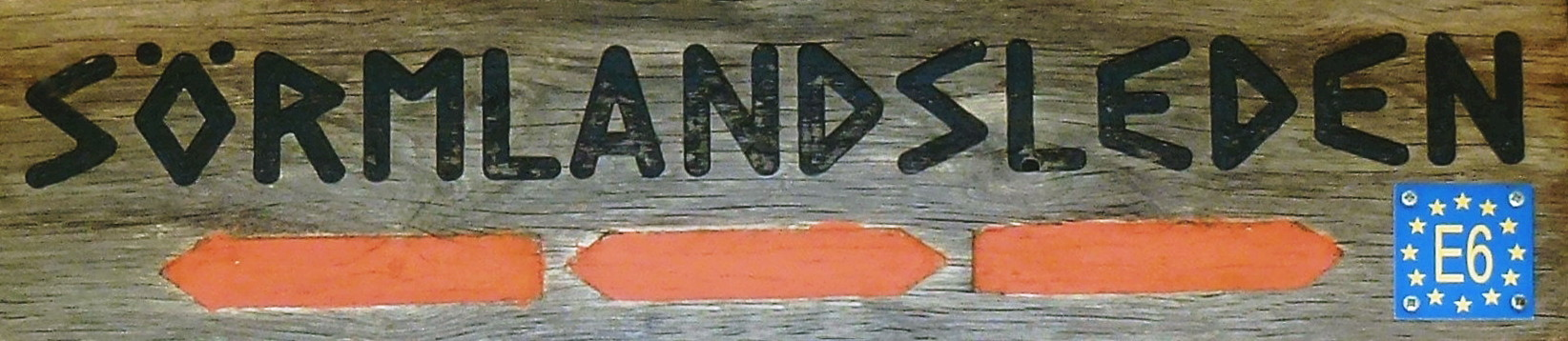 Sörmlandsleden skylt med markering för Europaled E6 till höger